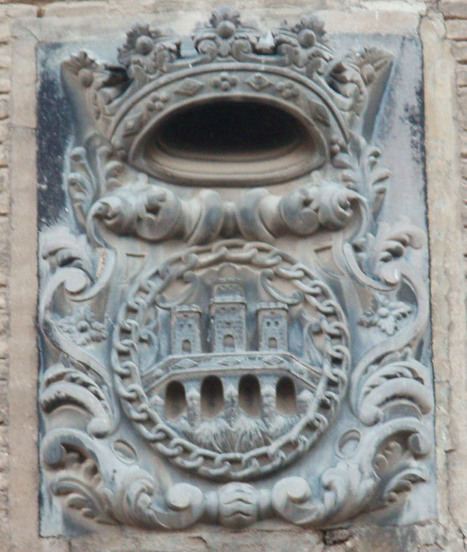 Escudo de Tudela, en los exteriores de la Capilla de Santa Ana de la Catedral de Tudela, en 2010